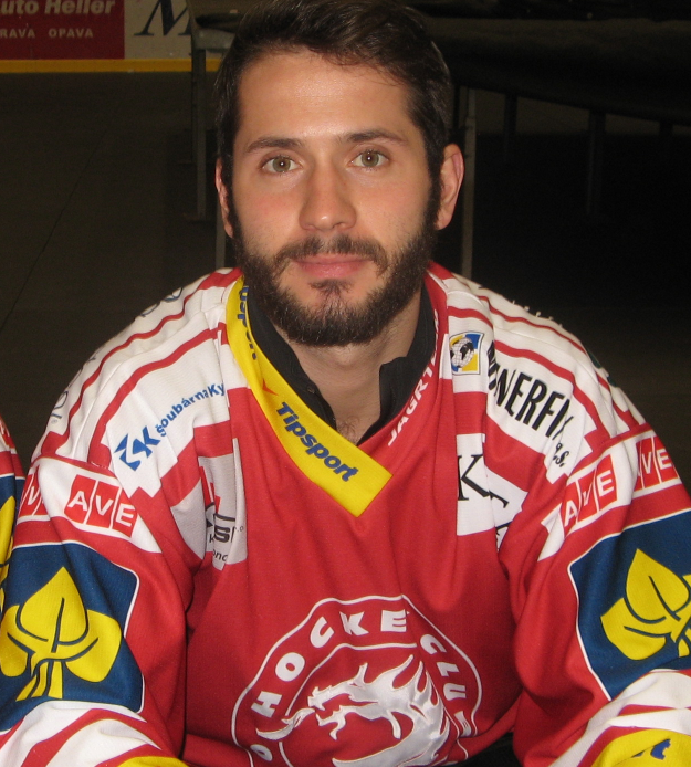 Po zakončení sezóny 2014/15 ve Werk Areně